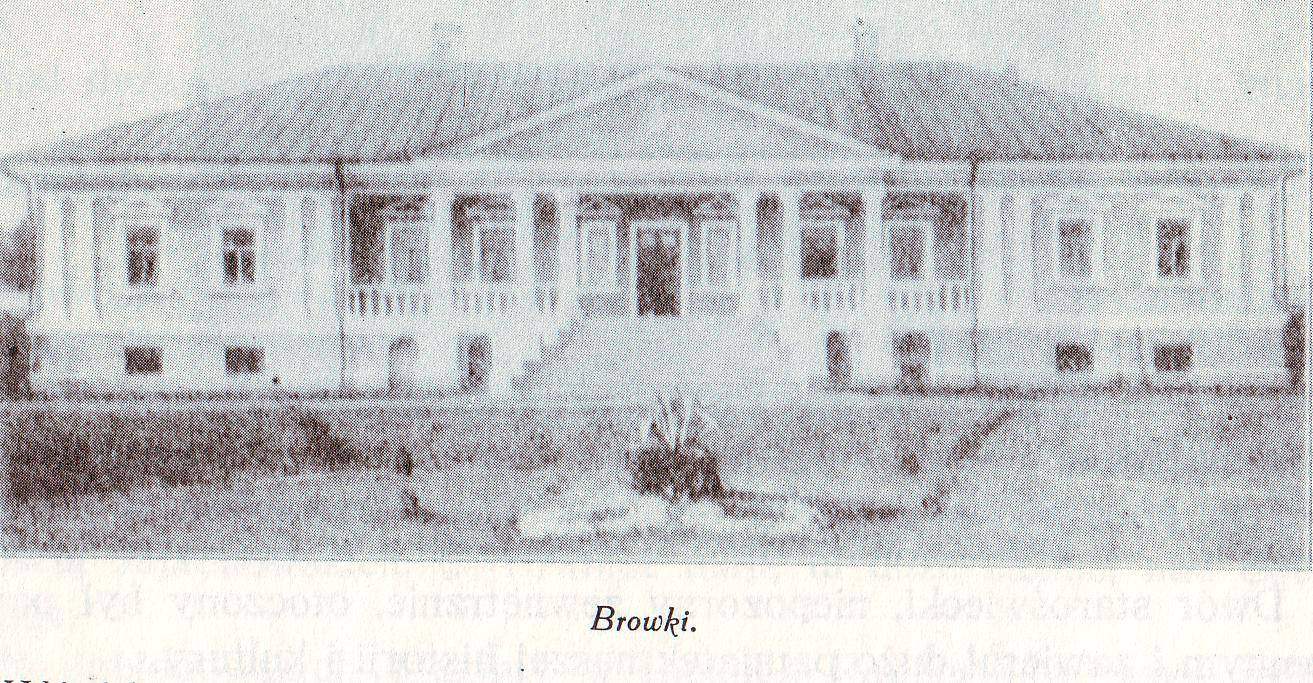 Browki